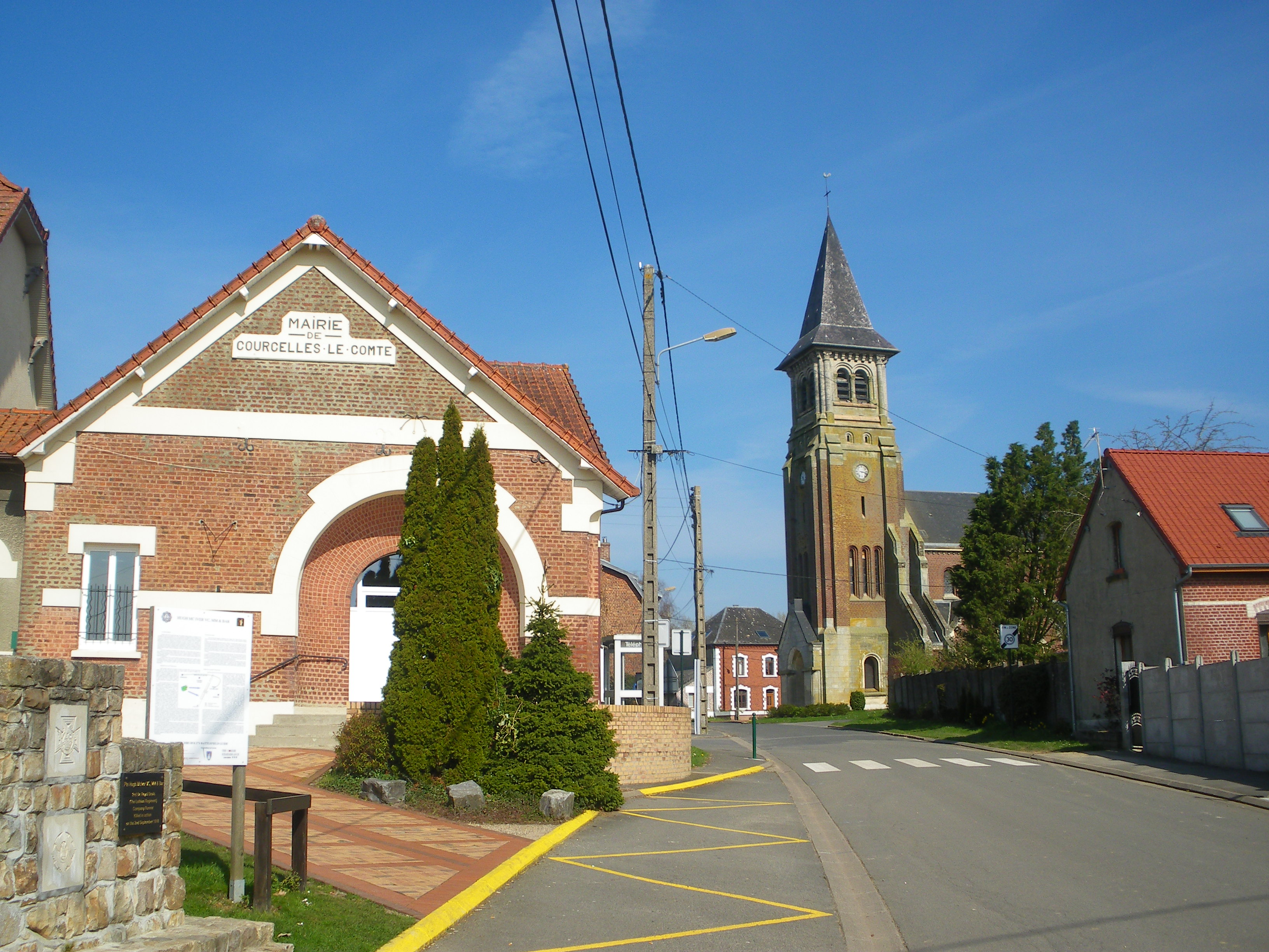 Vue du centre de la commune de Courcelles-le-Comte.